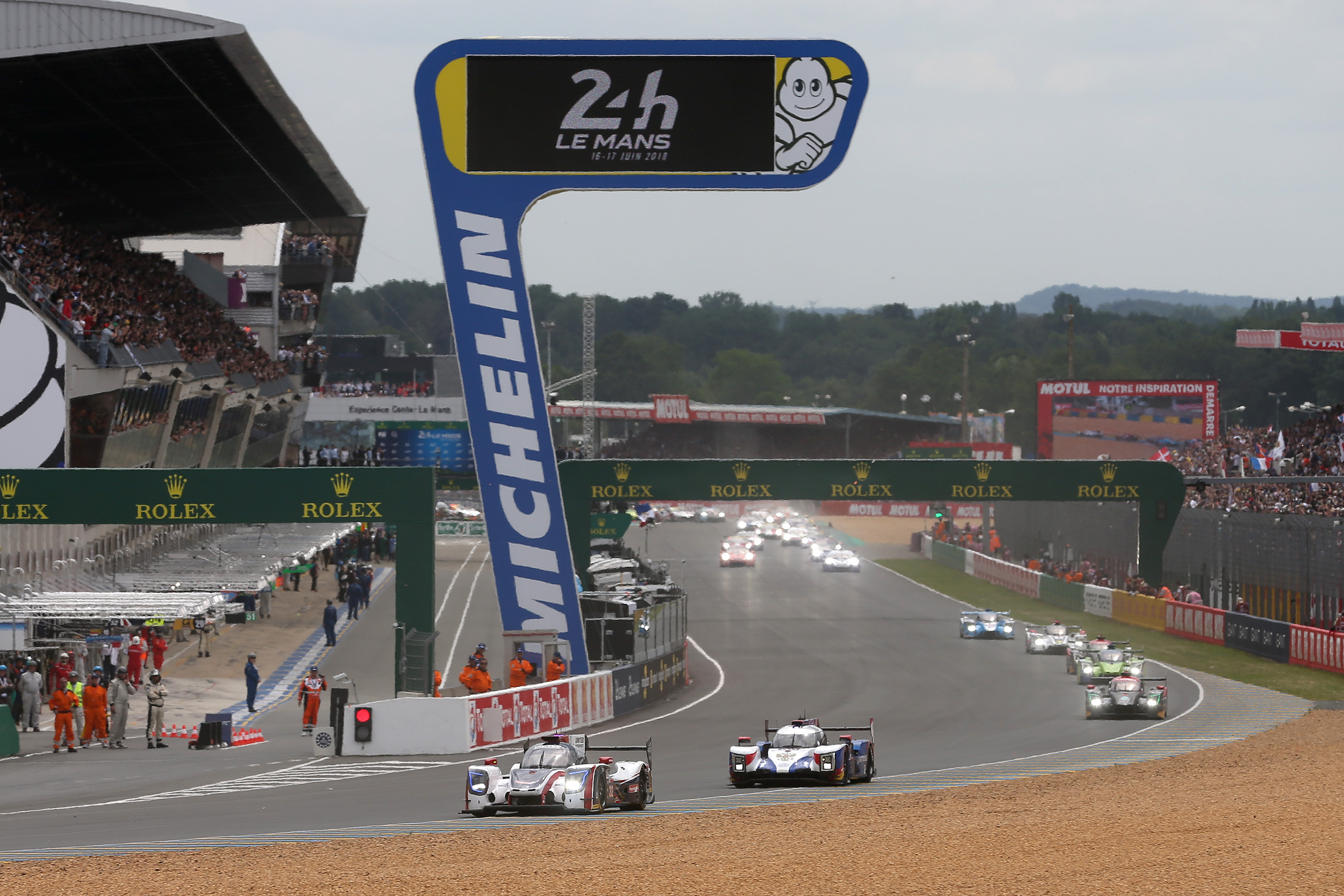 United Autosport lors des 24 Heures du Mans 2018.